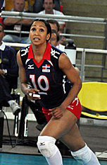 La pallavolista Milagros Cabral